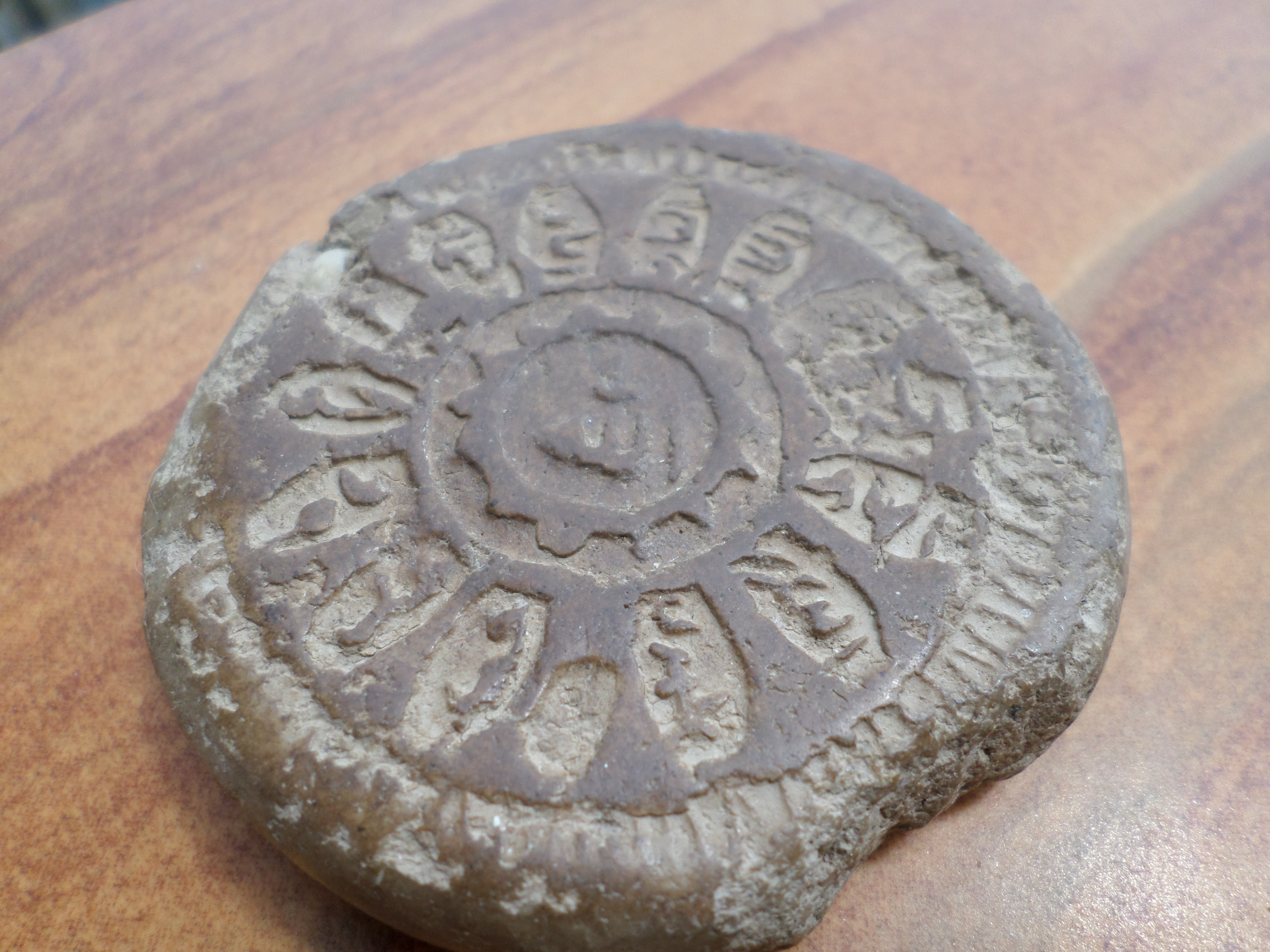 A model of a iraqi Turbah